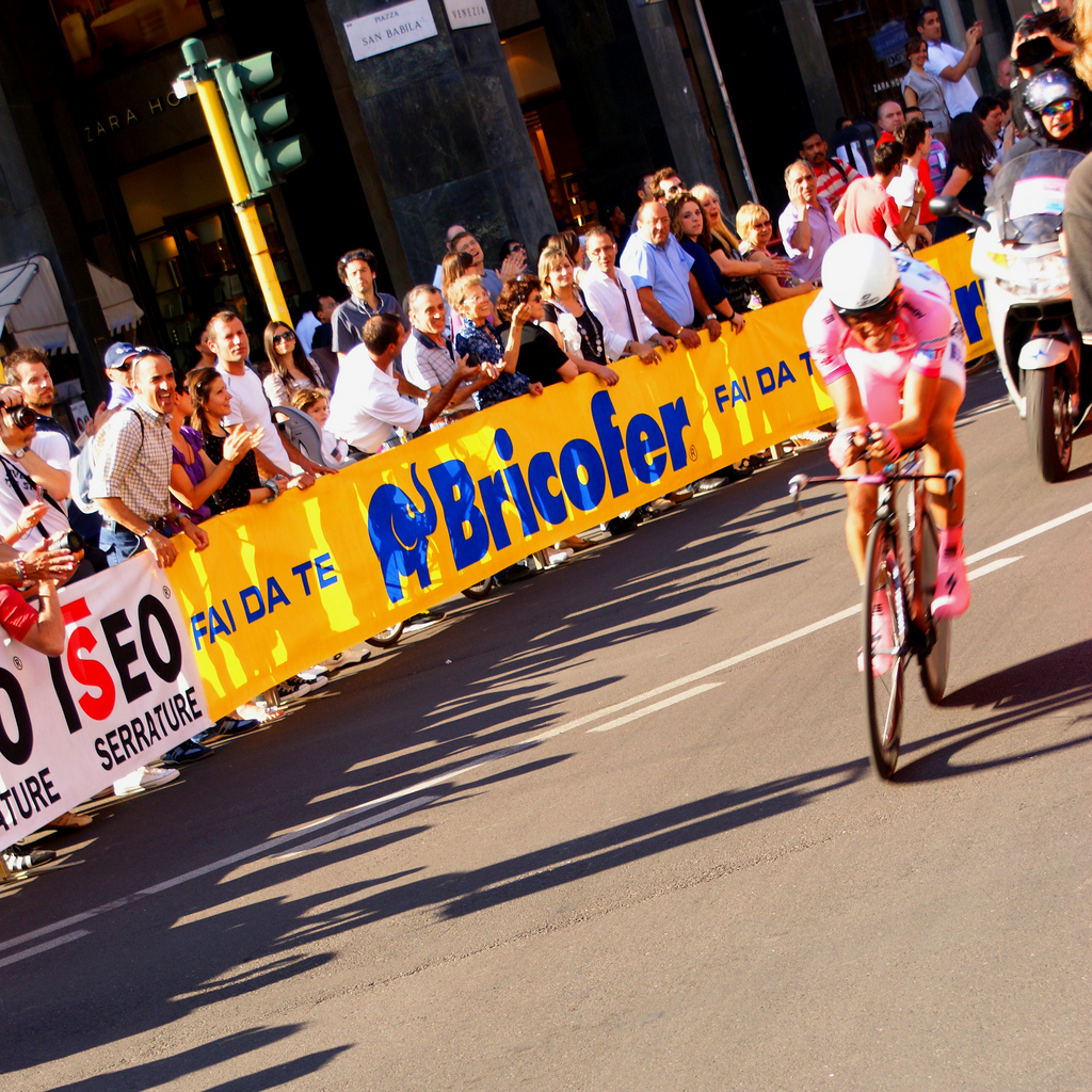 Contador